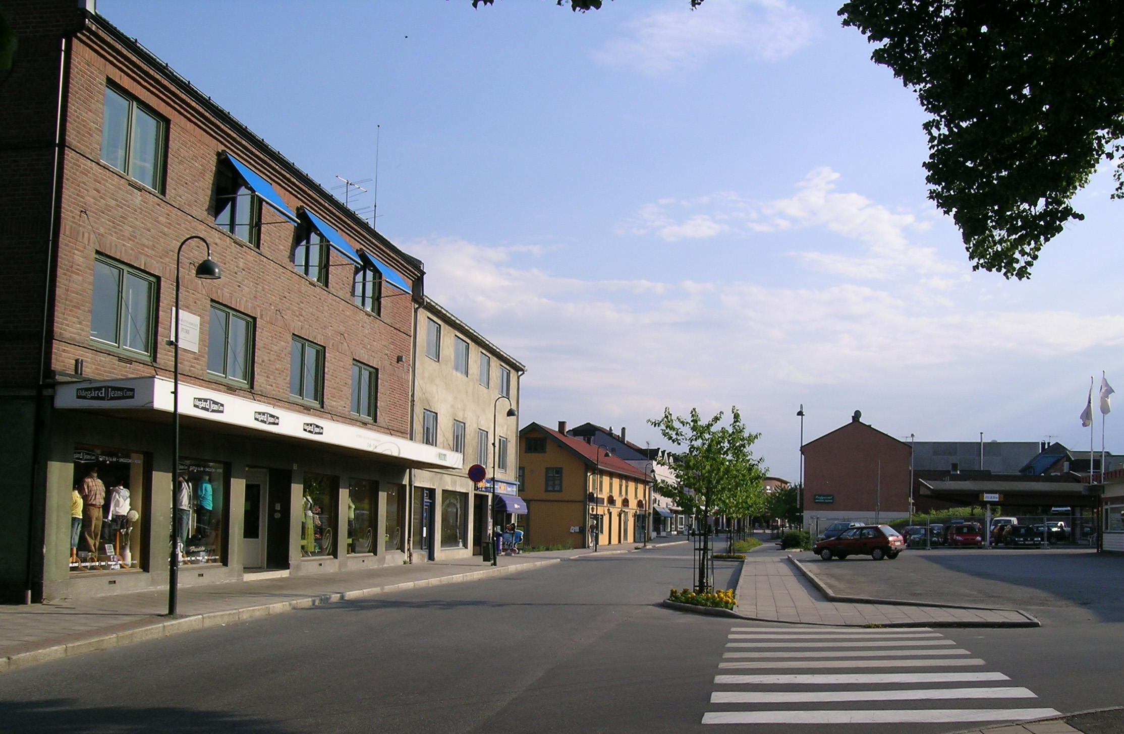 Vikersund, Modum, Buskerud, Norway.